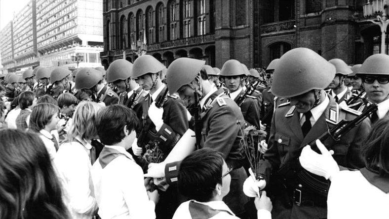 Berlin, 28. Jahrestag DDR-Gründung, Parade ADN-ZB Koard 7.10.77 Berlin: Ehrenparade -Eine eindrucksvolle Ehrenparade der NVA fand am Nationalfeiertag der DDR auf dem Berliner Marx-Engels-Platz statt. Nach der Parade kam es wie hier am Roten Rathaus zu zahlreichen herzlichen Begegnungen mit der Bevölkerung und den Soldaten. Information added by Wikimedia users.Bei diesem Foto handelt es sich nicht um eine Einheit der NVA. Am 7. Oktober 1977 vor dem "Roten Rathaus" in Berlin entstand dieses Foto des 2. Marschblocks der Grenztruppen der DDR! Zu sehen ist das 1. Marschglied des 2. Marschblock der Offiziersschule der Grenztruppen der DDR "Rosa Luxemburg" Plauen. Ich bin darauf auch zu sehen! Mit freundlichen Grüssen! Winfried Krebs (ehemaliger Offiziersschüler der Grenztruppen der DDR in Plauen und Major a.D. der Grenztruppen der DDR!)